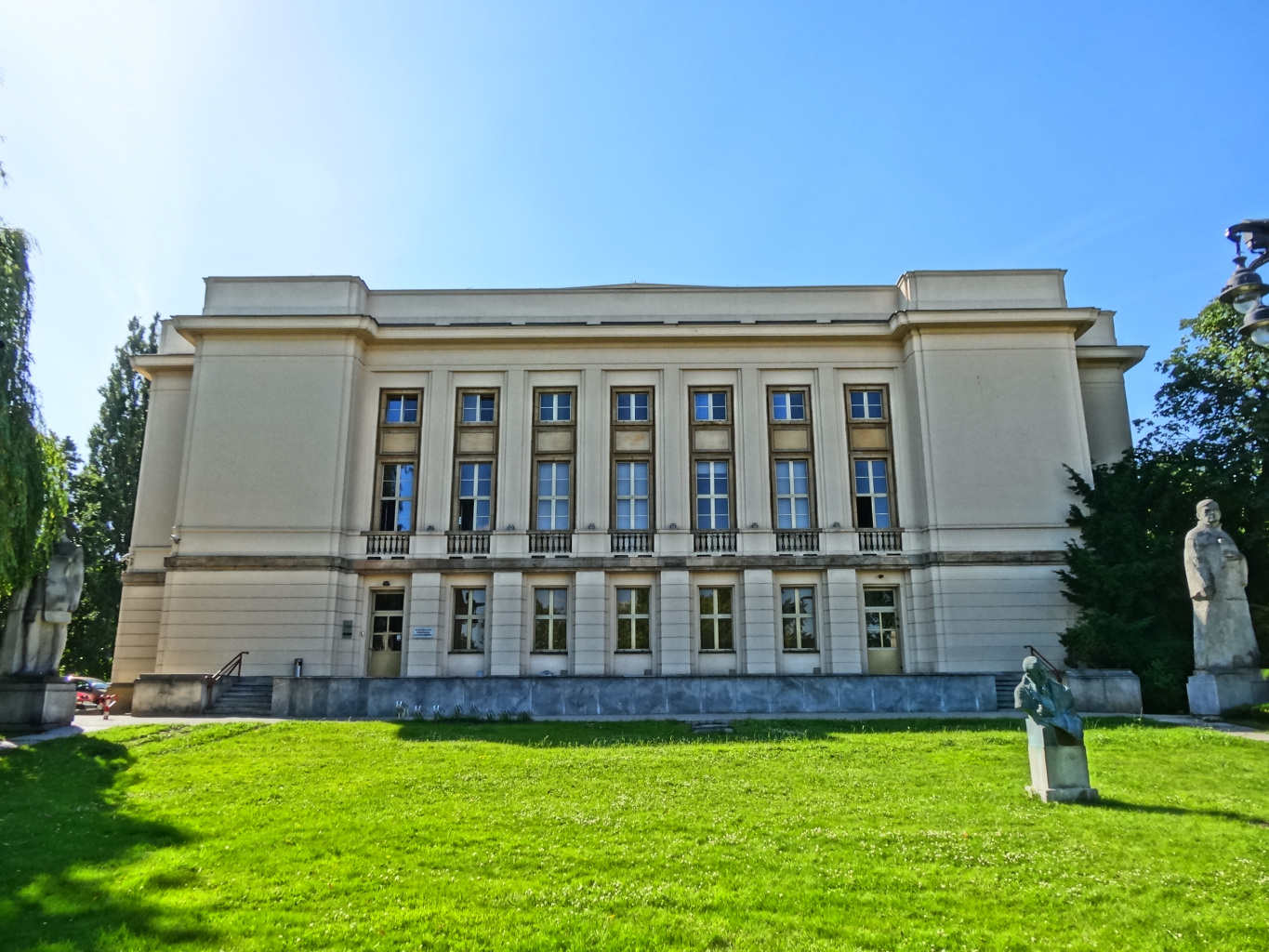 Budynek Filharmonii Pomorskiej im.Ignacego Jana Paderewskiego w Bydgoszczy zbud.w 1955 r.